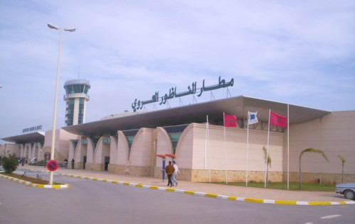 Terminal del aeropuerto de Nador (Marruecos)